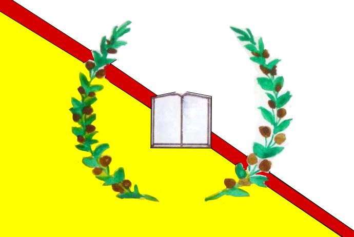 Drapeau du Haut Conseil pour l'unité de l'Azawad